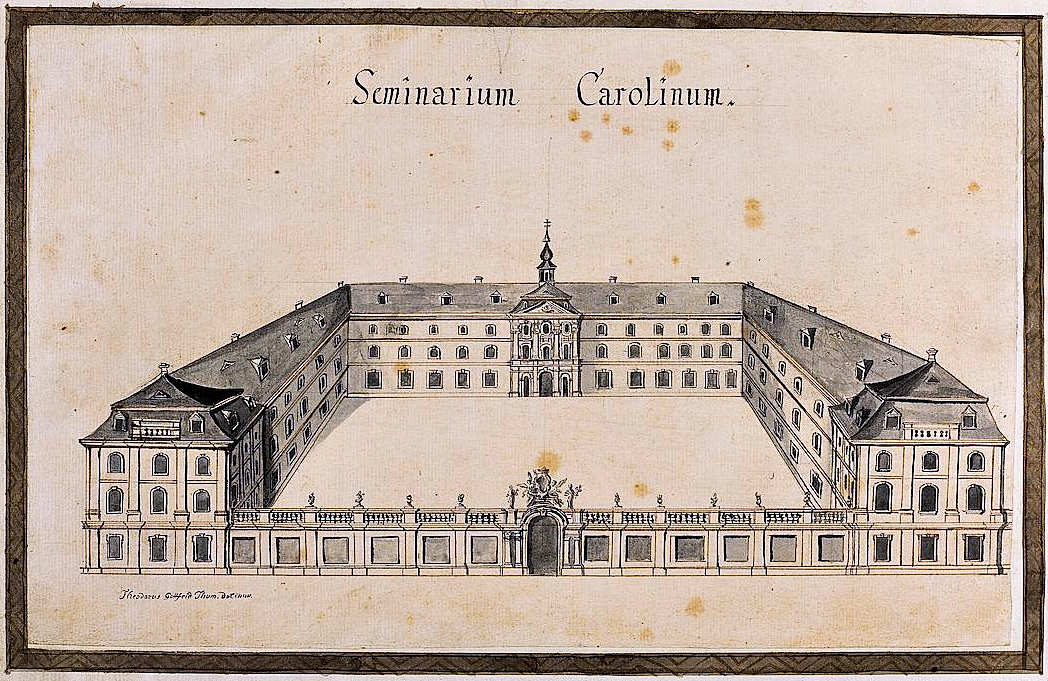 Das Seminarium Carolinum Heidelberg im Thesaurus Palatinus des Johann Franz Capellini von Wickenburg, um 1752